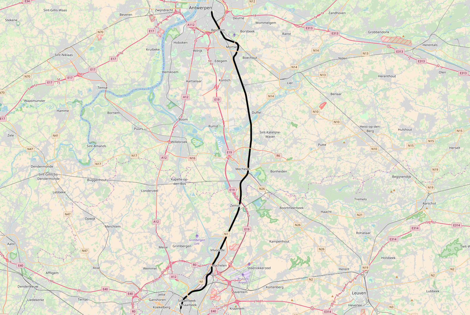 Belgian Railway Line 27, Brussel-Noord - Antwerpen-Centraal